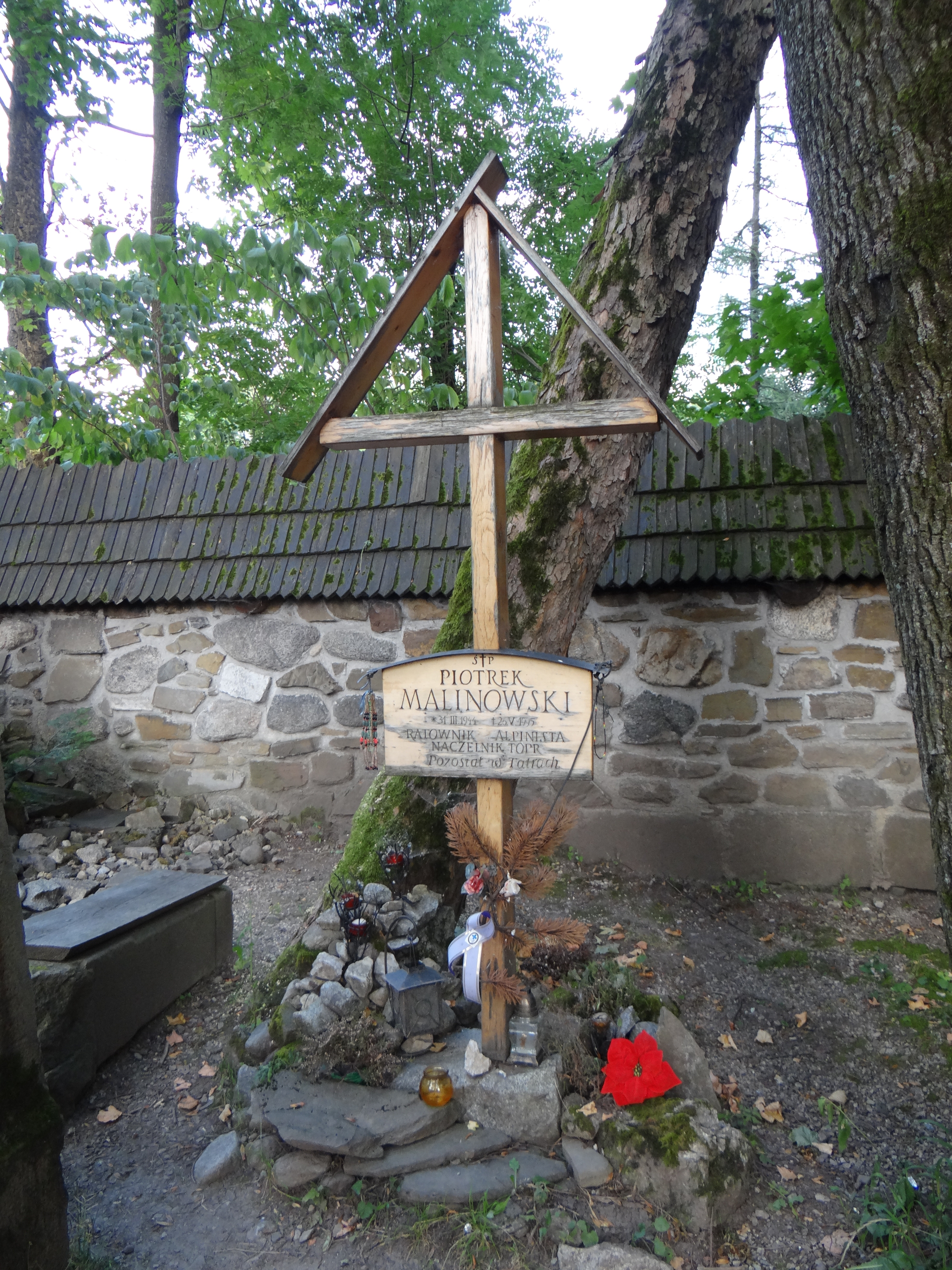 Grób Piotrka malinowskiego na Pęksowym Brzyzku w Zakopanem